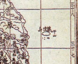 Daehan Jeondo, part